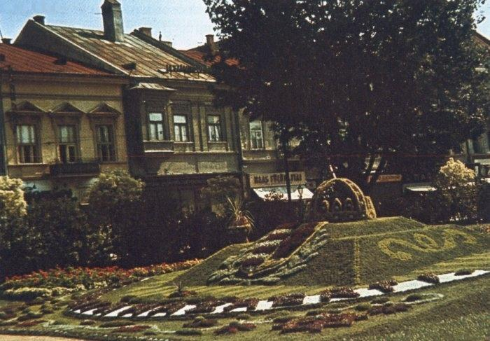 Košice 1938